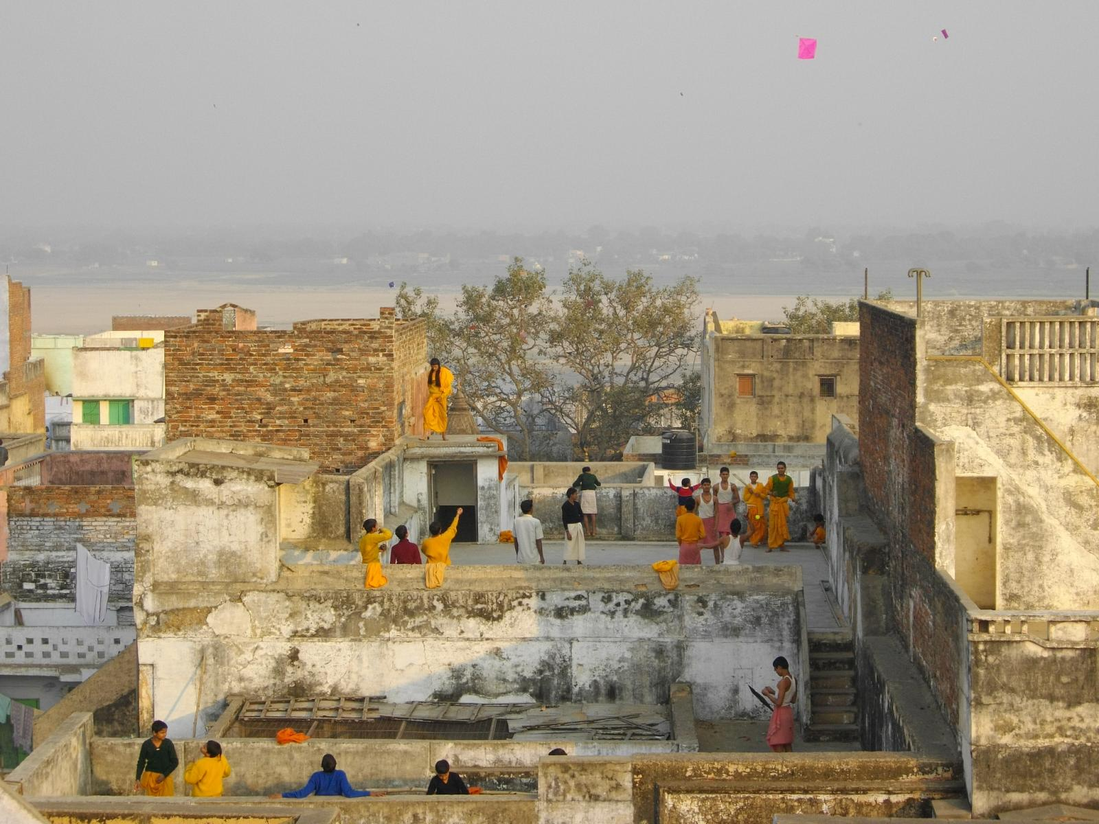 同じ服を着ているから、お坊さんの宿舎？ 夕方、屋上で凧揚げをしたり、ボール遊びをしていた。